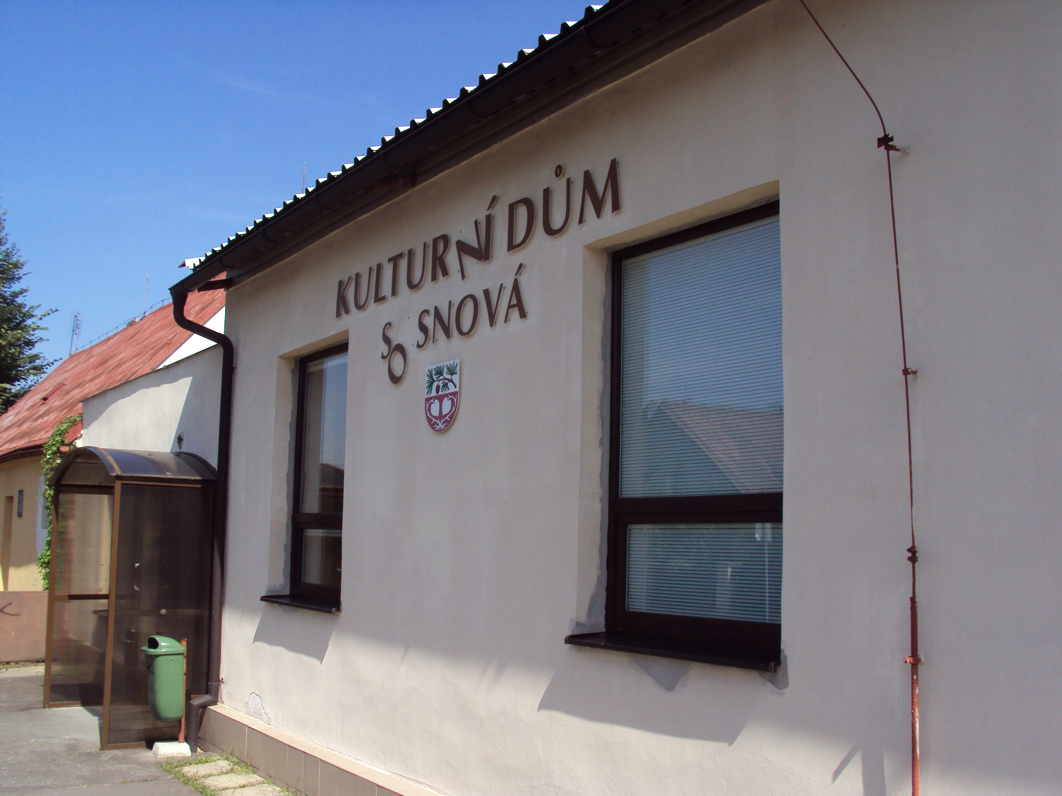 Kulturní dům v obci Sosnová